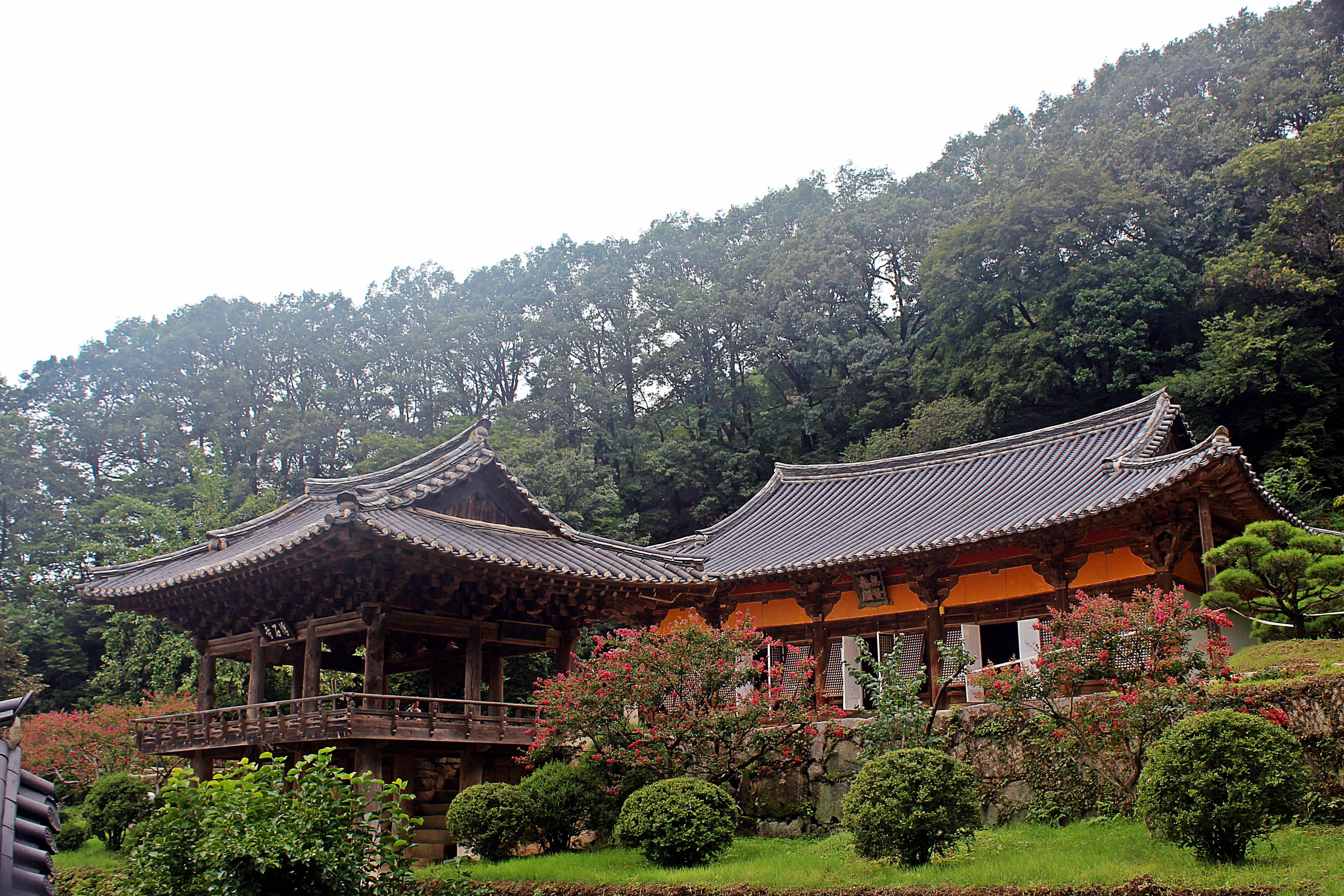 부석사 무량수전은 한국에서 가장오래된 목조건축물 (고려중기 후반이 건축물로 추측 )